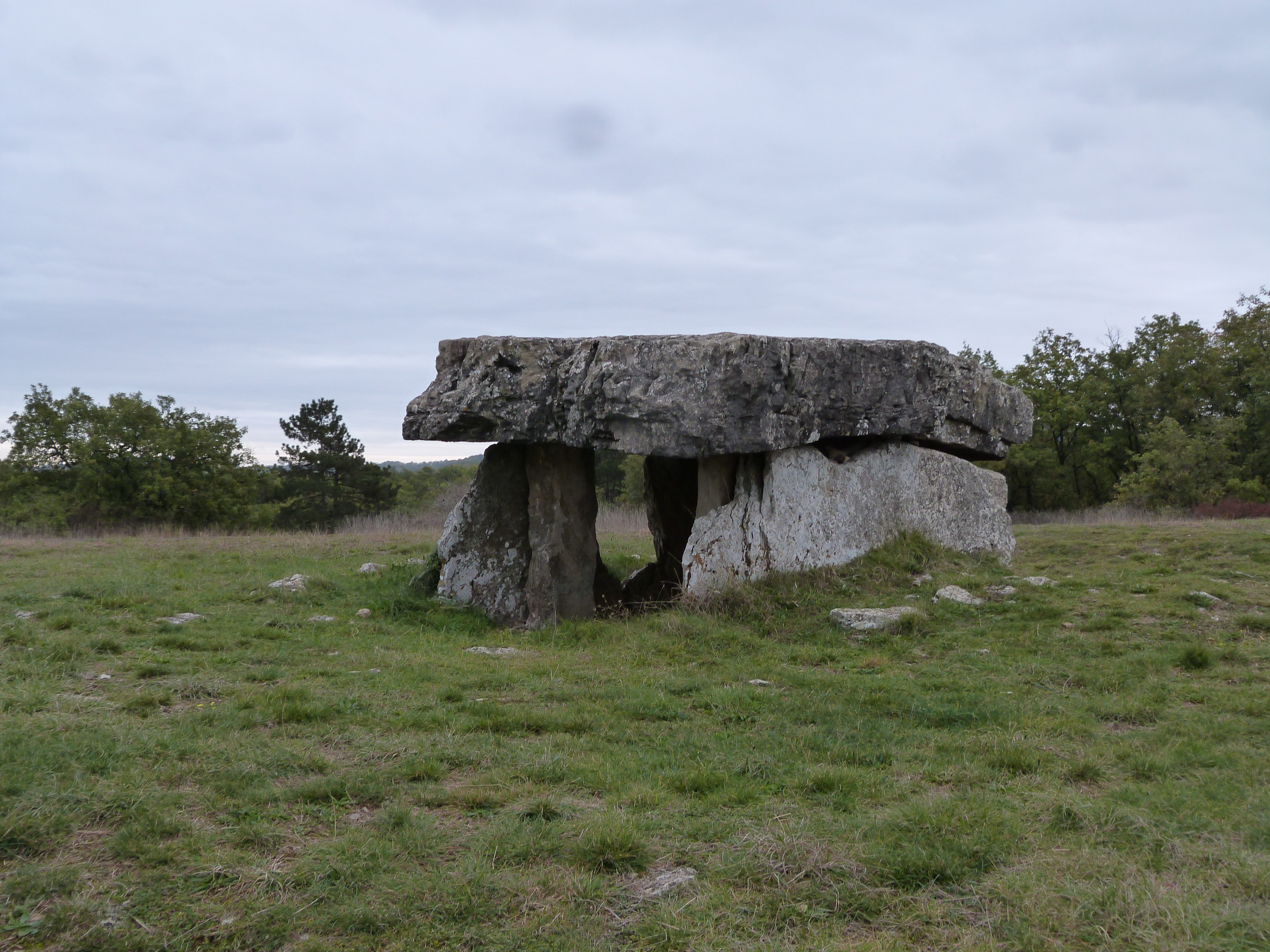 Peyrelevade .